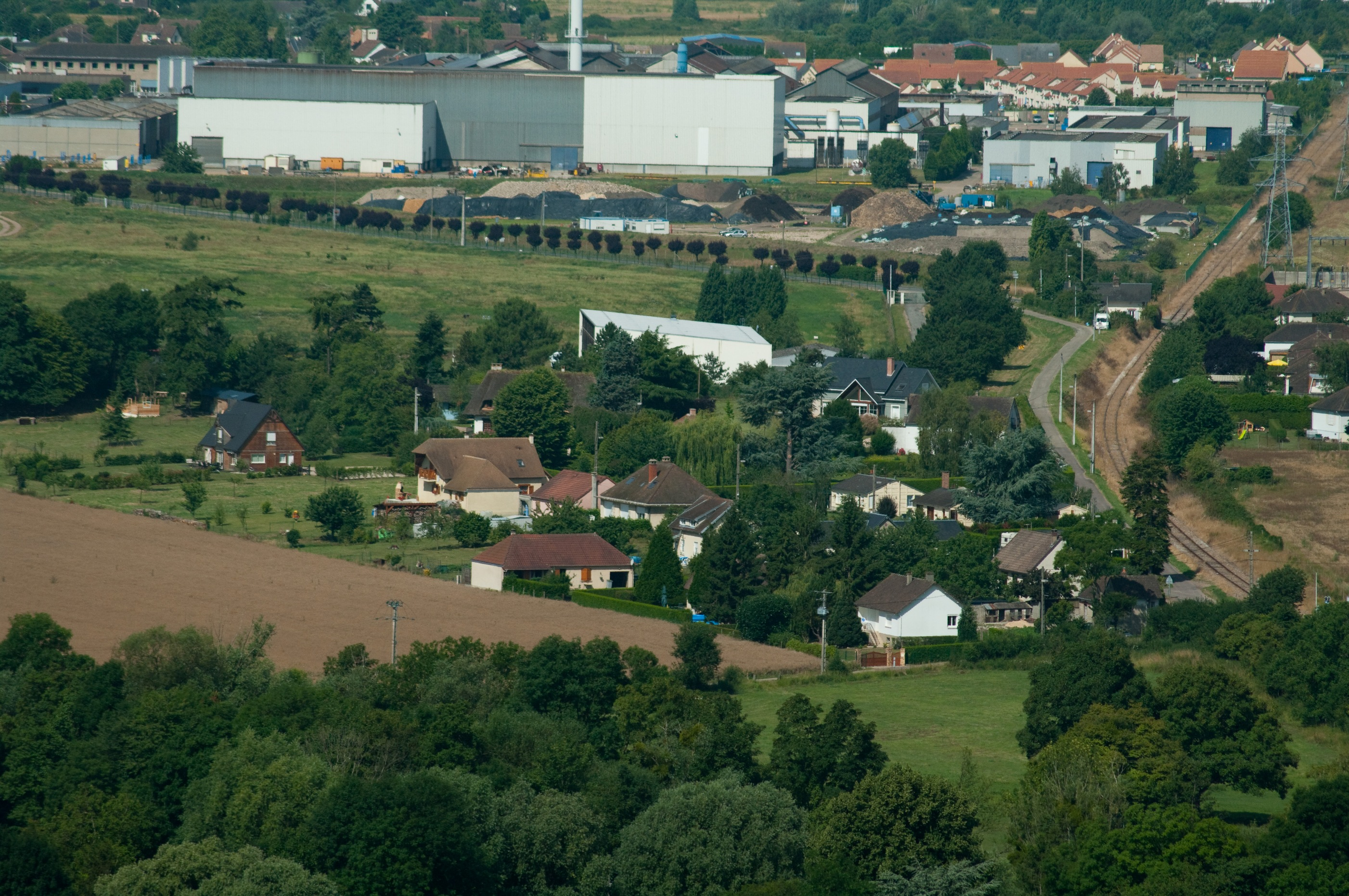 Photographie du Nouveau Pîtres depuis la colline des Deux-Amants